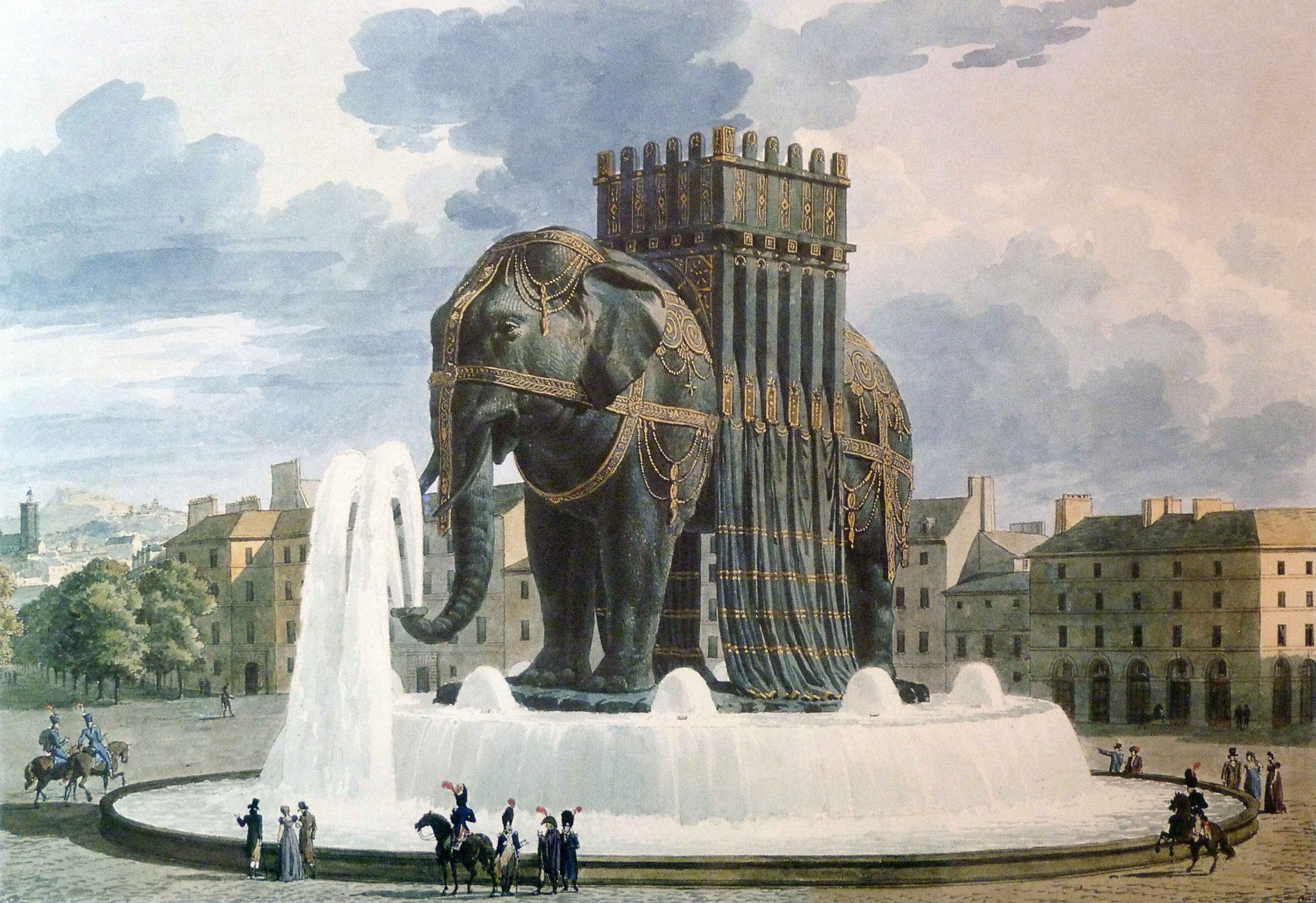 Aquarelle de Jean-Antoine Alavoine (1776-1834) Dernier projet pour la fontaine de l'Éléphant de la Bastille (1809-1810) - H : 41 cm, L : 51,8 cm - L'aquarelle est contresignée par Vivant Denon et Alavoine (architecte du projet) - Musée du Louvre, Paris